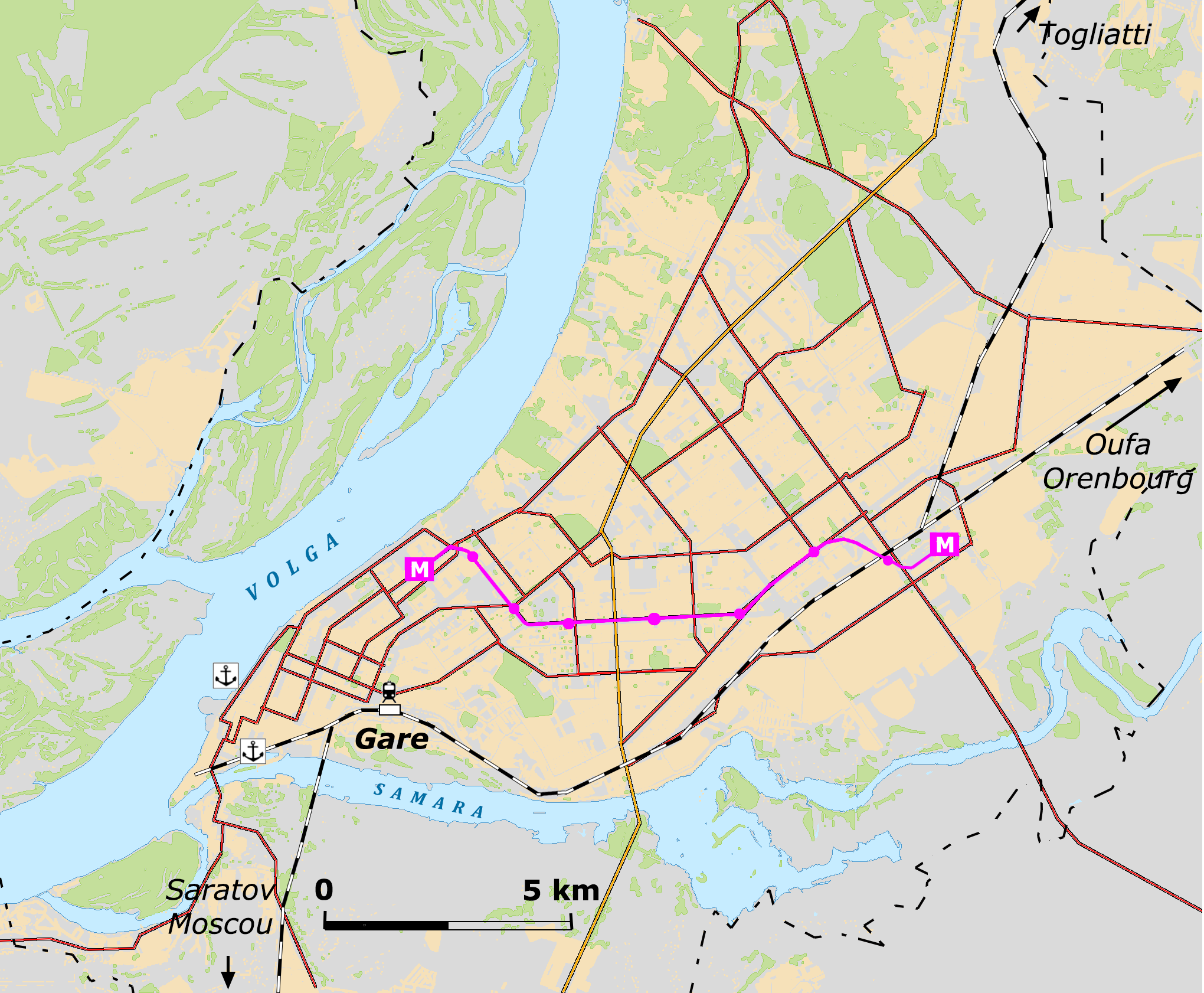 Carte Samara avec légende en français